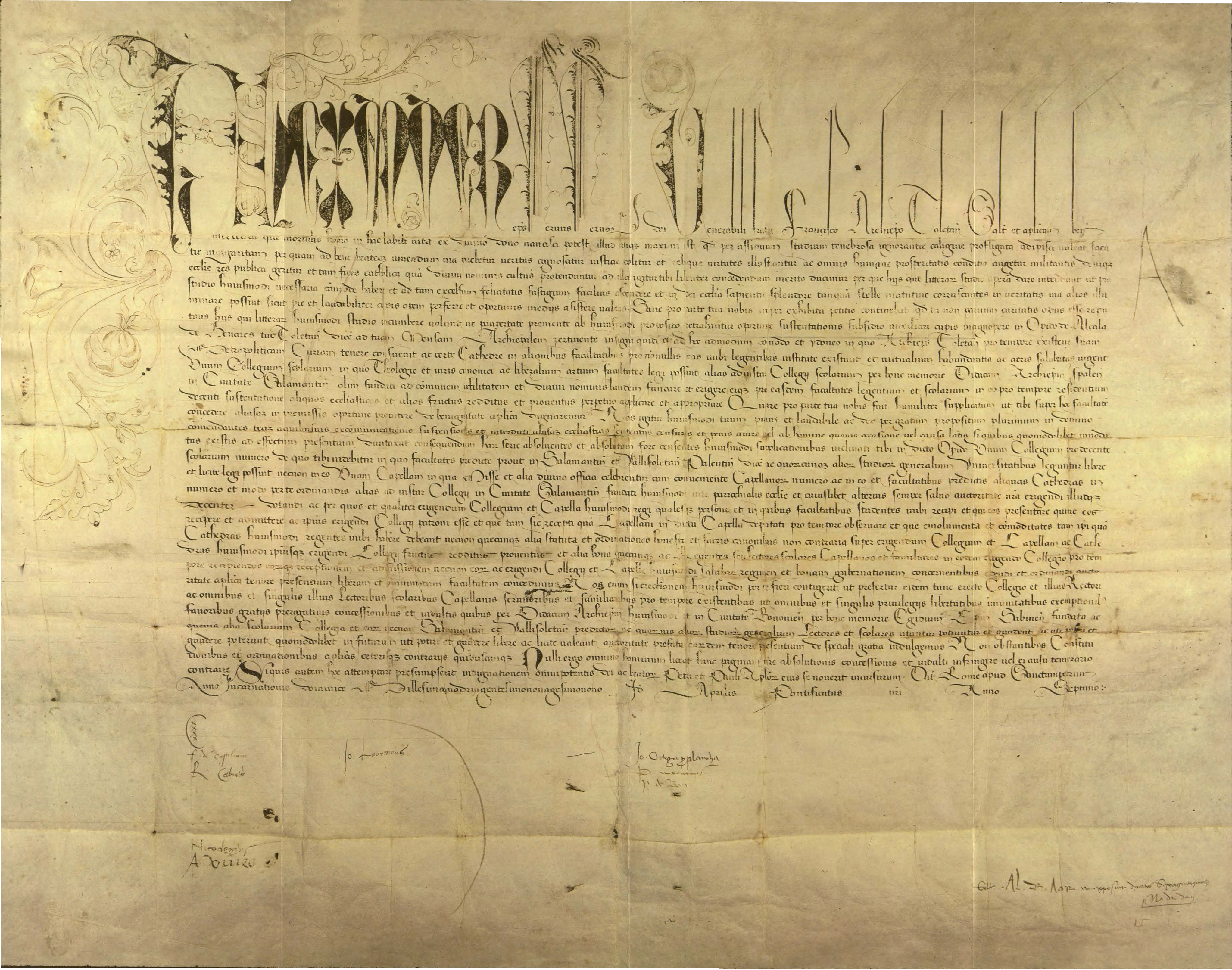 Carta bulada en la que Alejandro VI autoriza la fundación de un Colegio en Alcalá de Henares. Fechada en Roma, el 13 de abril de 1499.